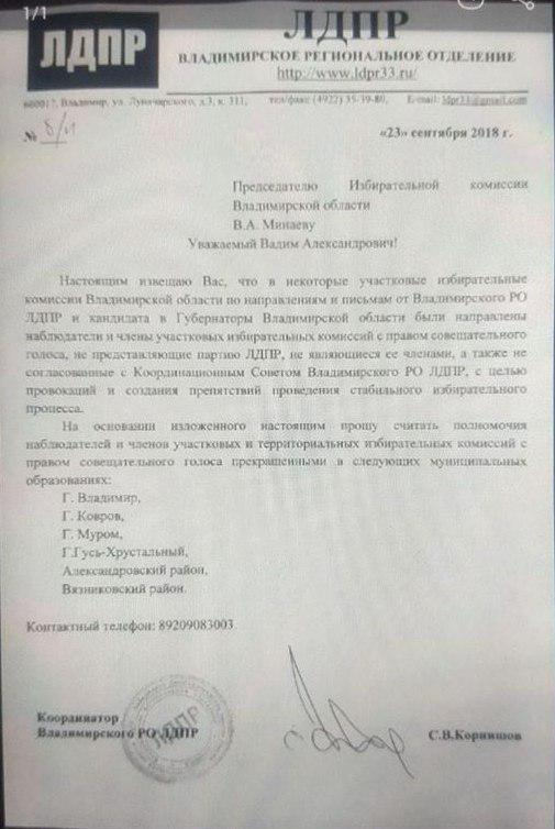 Письмо координатора регионального отделения ЛДПР Сергея Корнишева председателю Избирательной комиссии Владимирской области об отзыве наблюдателей от ЛДПР во время второго тура выборов губернатора Владимирской области (2018)